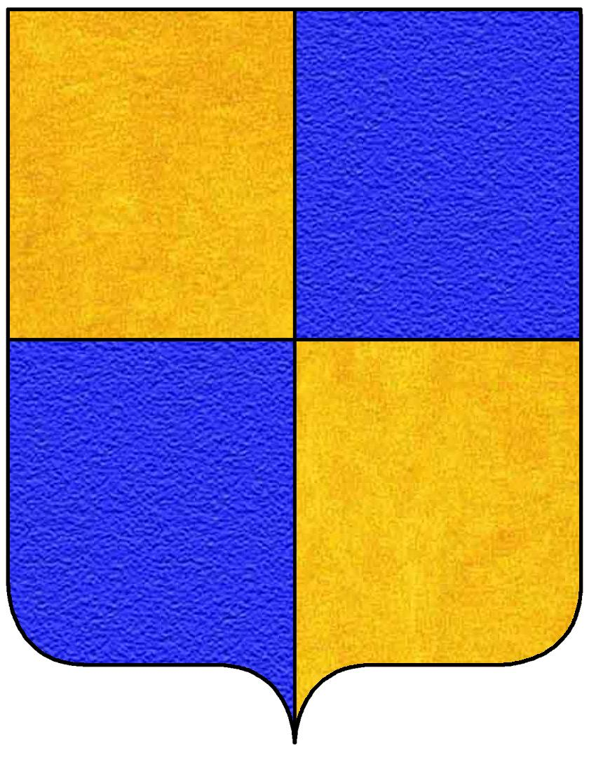 Stemma della famiglia Caldora